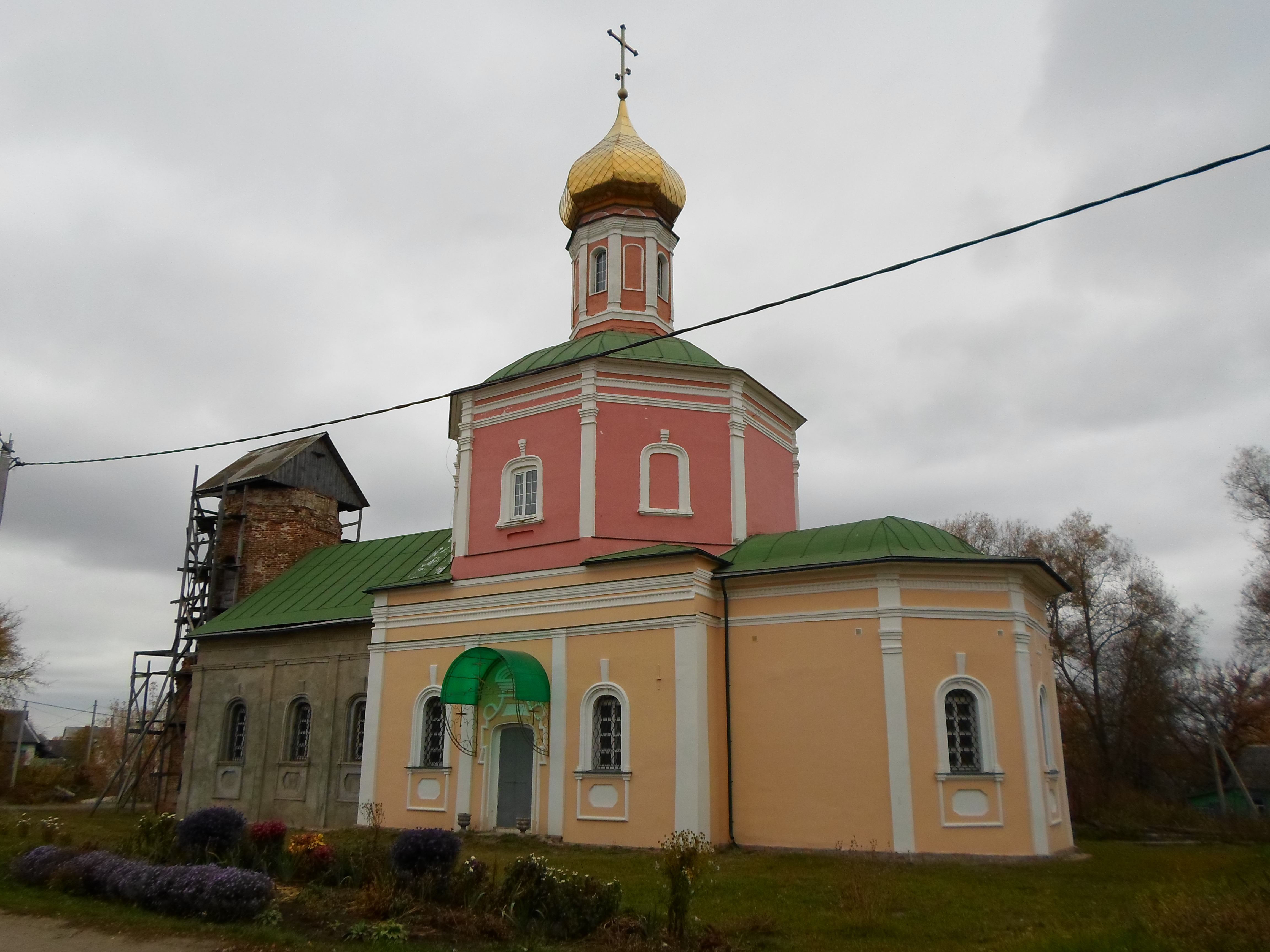 Церковь Дмитрия Солунского: Отрадное (ранее с. Голяжье), Брянский район, Брянская область